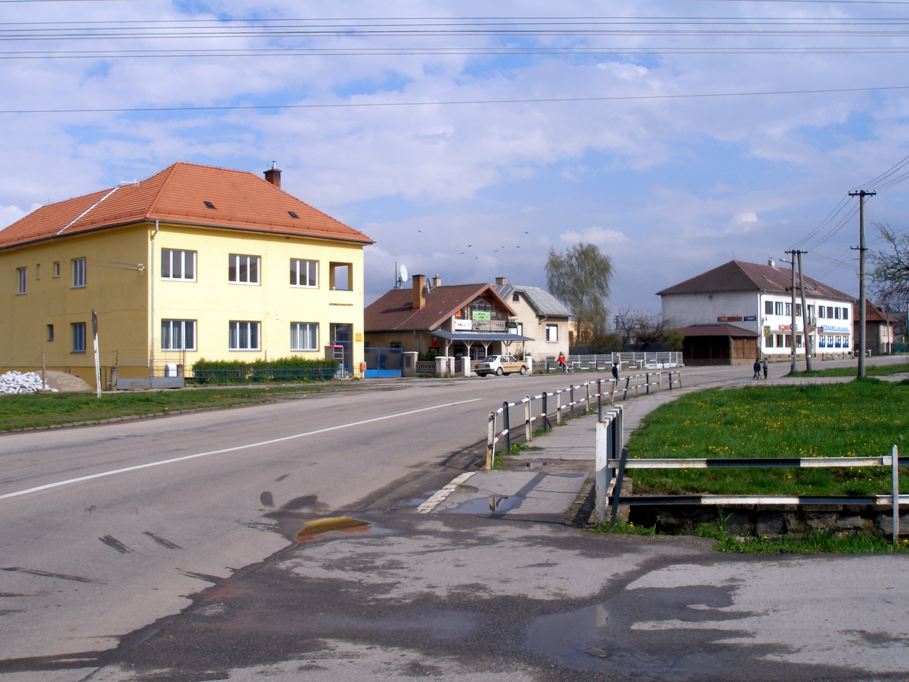 Obec Lemešany okres Prešov región Šariš